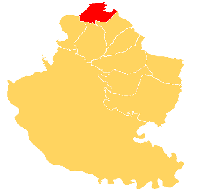 Distrito Chilcas se encuentra en el Norte del Departamento Victoria.